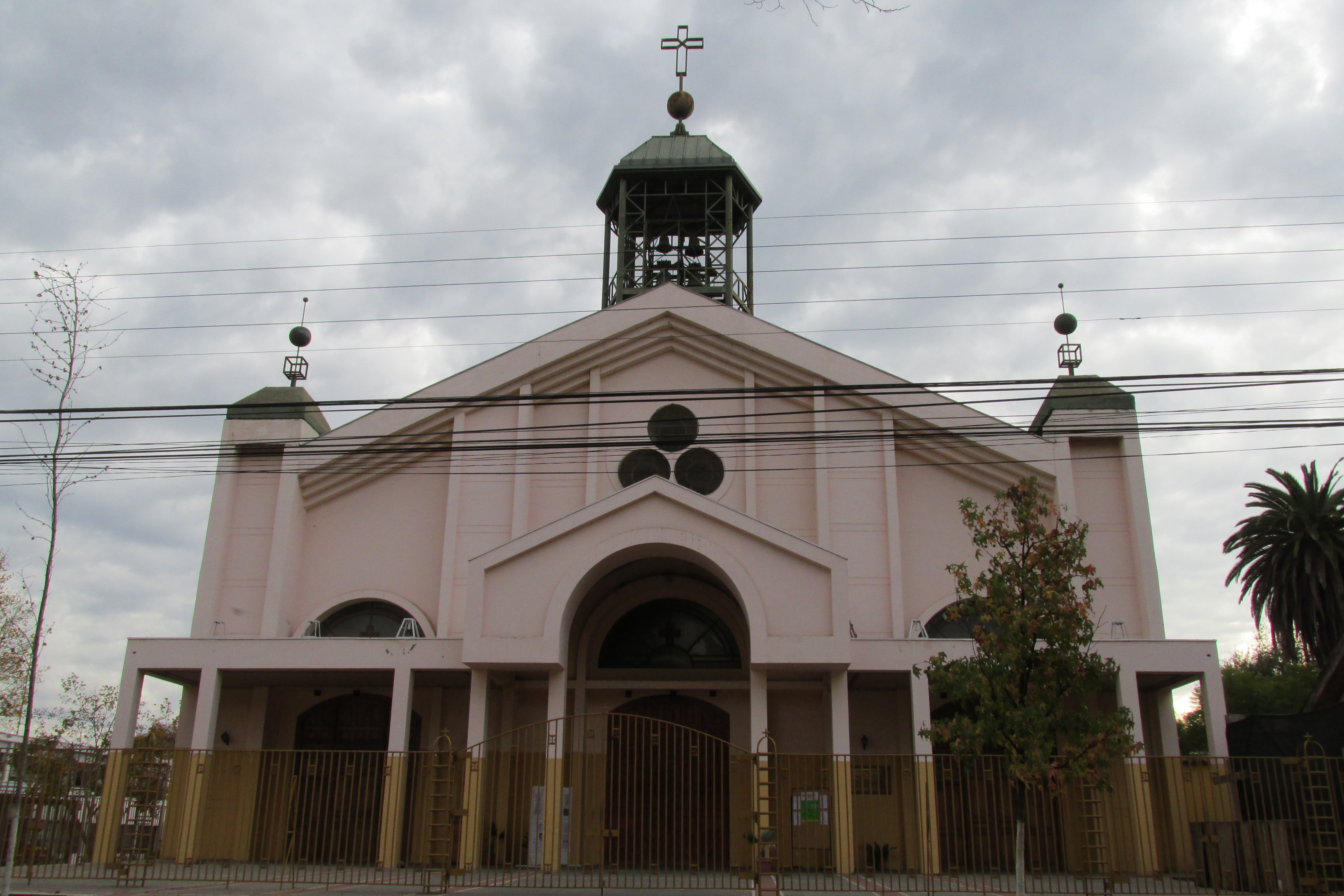 Frontis Basílica de Santa Ana de Rengo